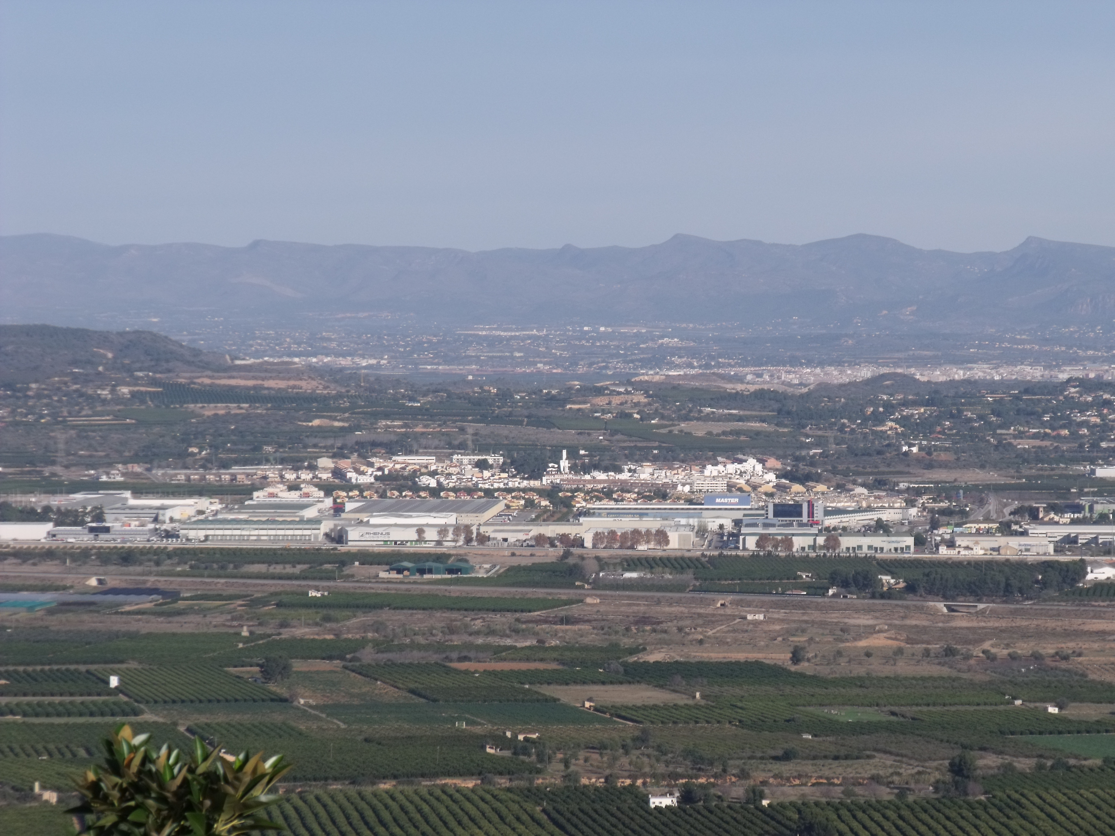 Vista del Pla de Quart, con Loriguilla.